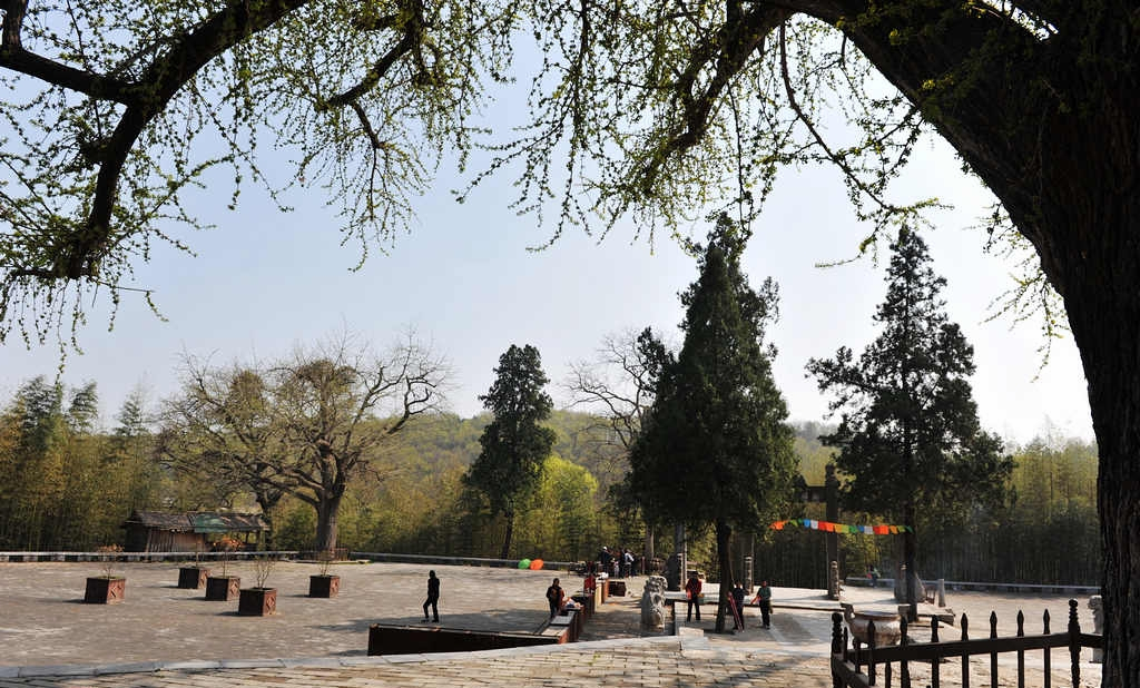 Xichuan